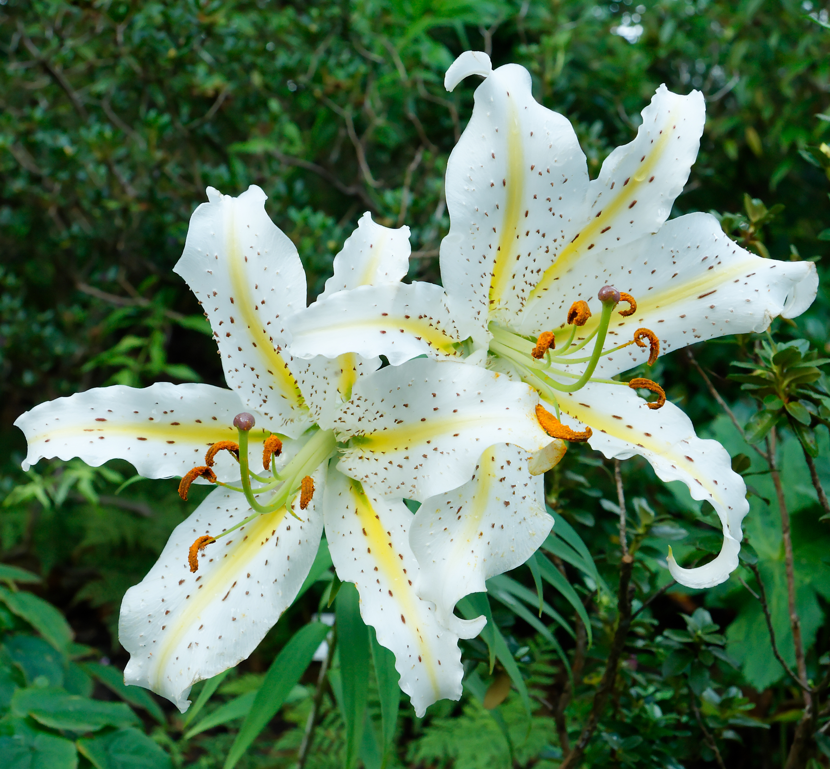 Lilium japonicum